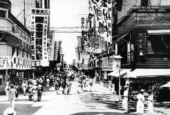 『大衆的な浅草六区 映画館街の雑沓』、浅草公園六区の映画街、（大東京、松竹館、金龍館、常盤座、東京倶楽部、電気館）、1933年8月の写真